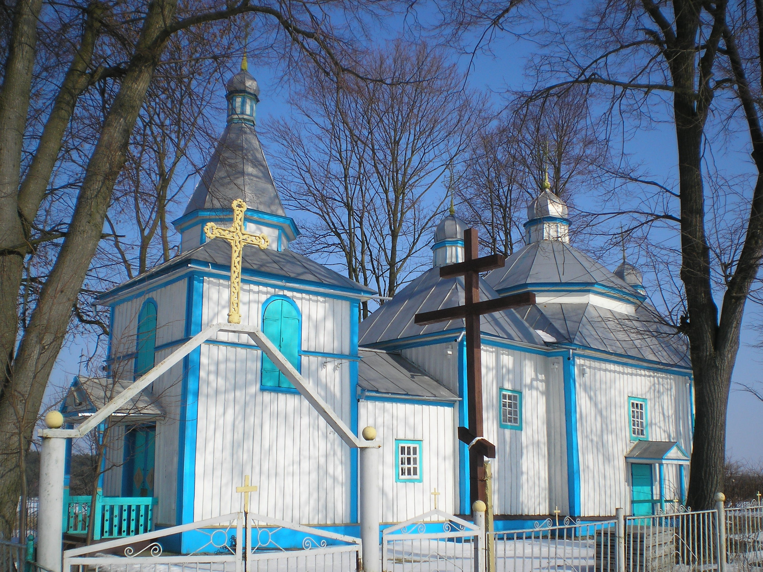 Здвиженська церква з дзвіницею (дер.), с.Кам'яний Брід